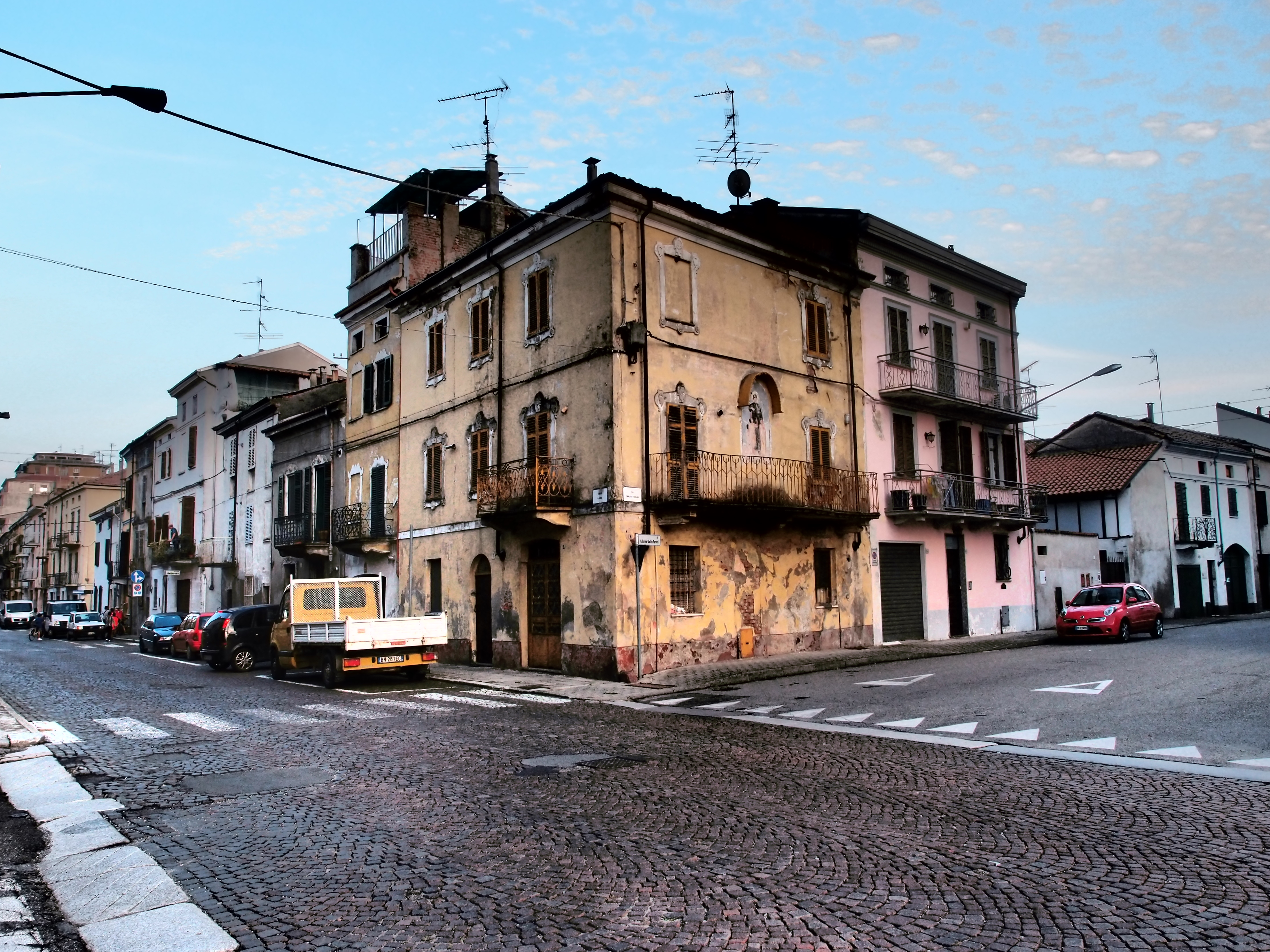 Straße in Trino, Piemont